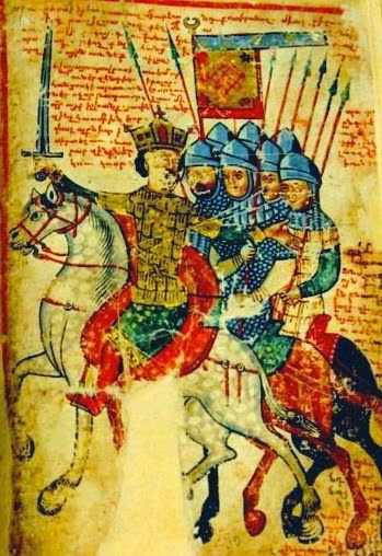 «Ալեքսանդրի վէպ» գրքից, Սբ Ղազարի մատենադարան